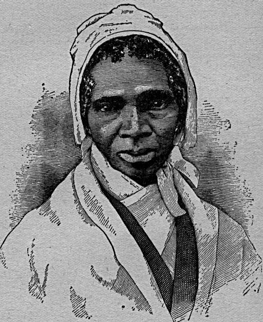 Image issue du domaine public (Domaine Public é‰tats-Unis). Source : Norman B. Wood (1897), "White Side of a Black Subject", American Publishing, Chicago, Illinois. Téléchargé depuis le site de l'université du Texas (UTOPIA). Illustration d'origine Wikipedia en: Image:Sojourner_Truth_2.jpg